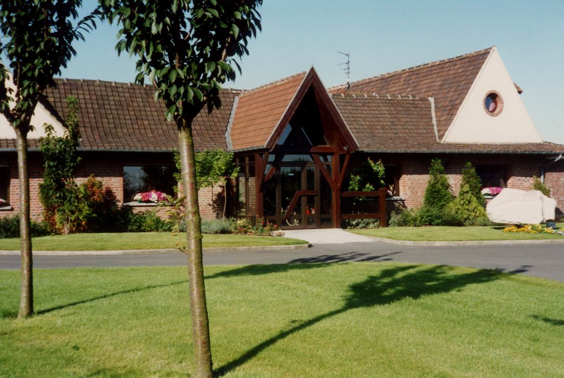 Deuxième Centre d'éducation des chiens guides de Monsieur Corteville